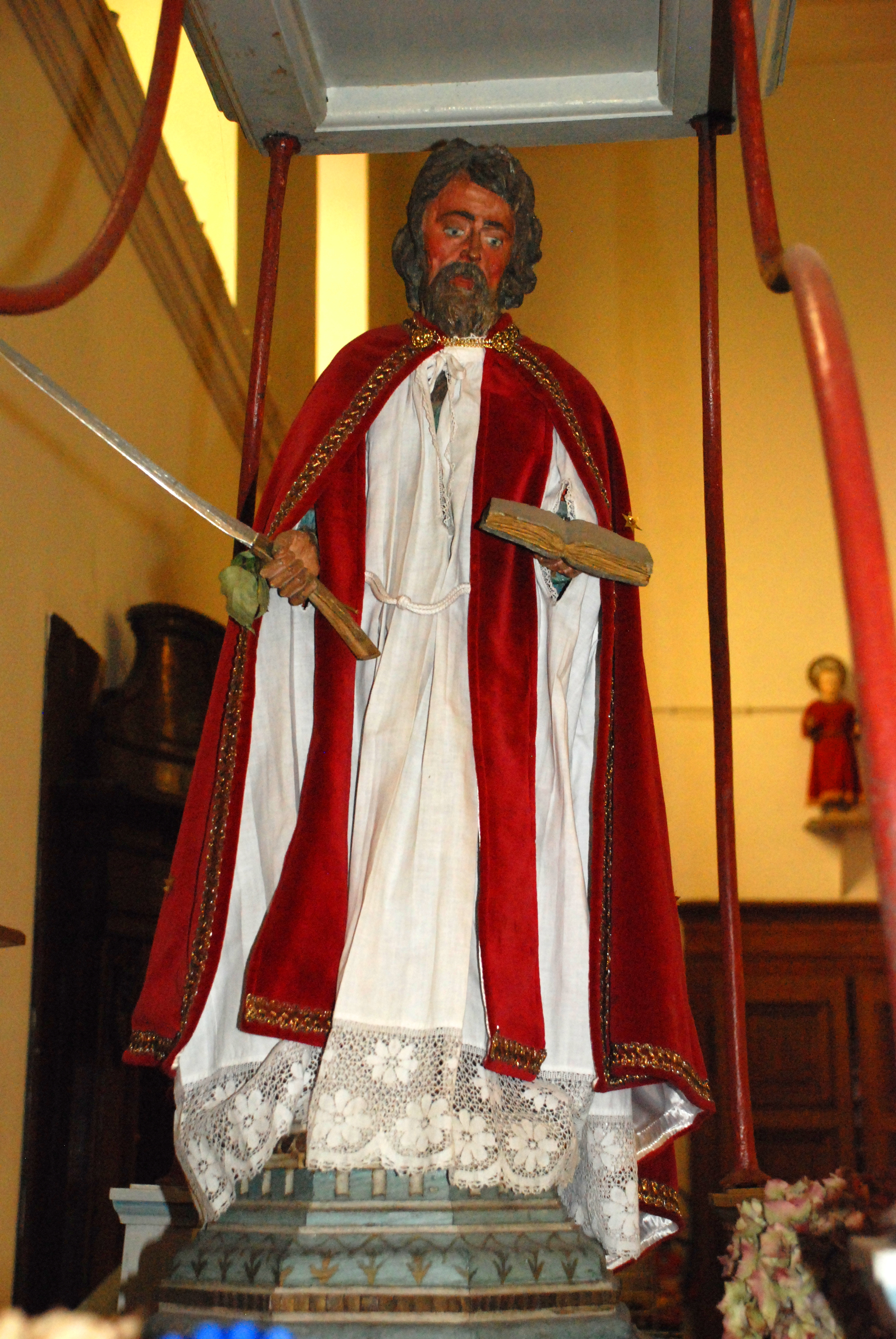 Belgique - Église Saint-Barthélemy de Bousval - Char de Saint-Barthélemy